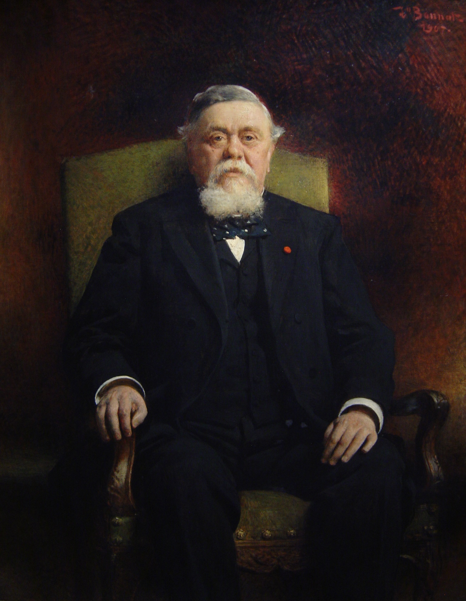 Portrait du président Armand Fallières